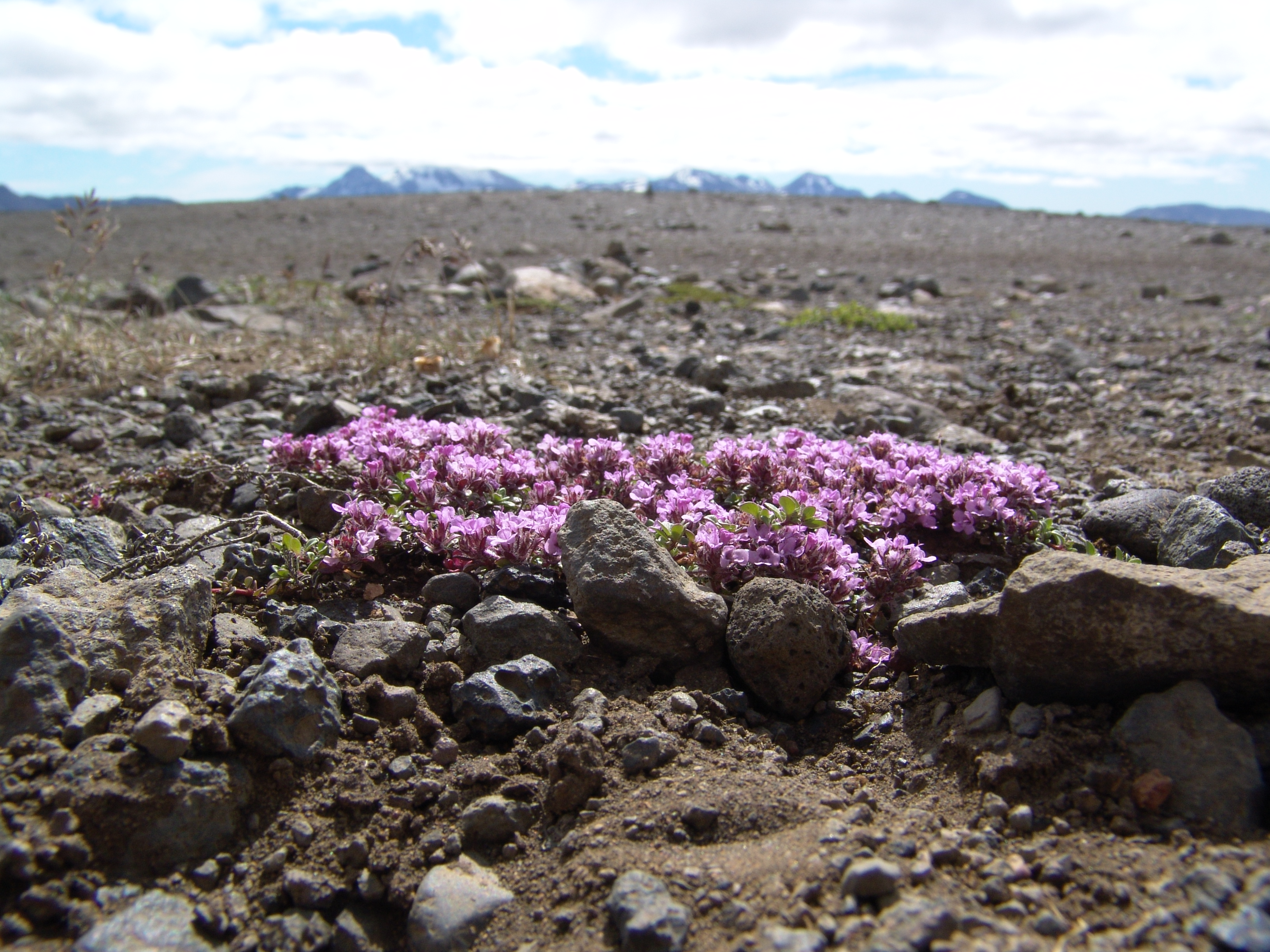 Island, Landschaft.